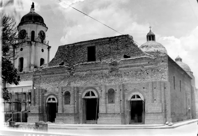 Antigua Catedral de Barquisimeto en Reconstrucción tras el terremoto de 1812, se tardaron mas de 40 años para reconstruirla.